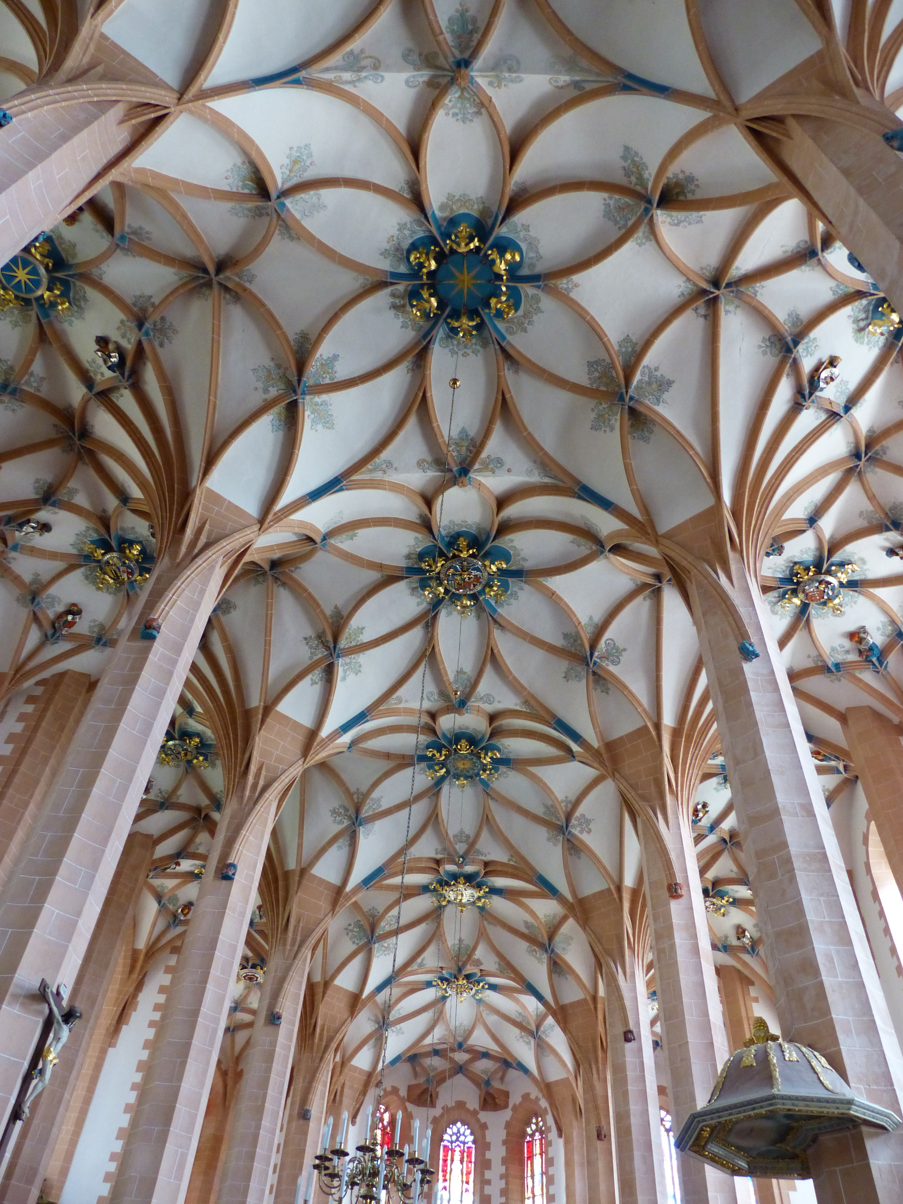 St. Annenkirche (Annaberg-Buchholz), Sachsen